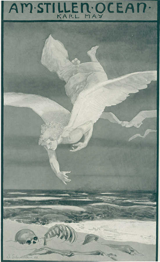 Deckelbild zu Karl Mays Reiseerzählung "Am Stillen Ocean" (Sascha-Schneider-Ausgabe)